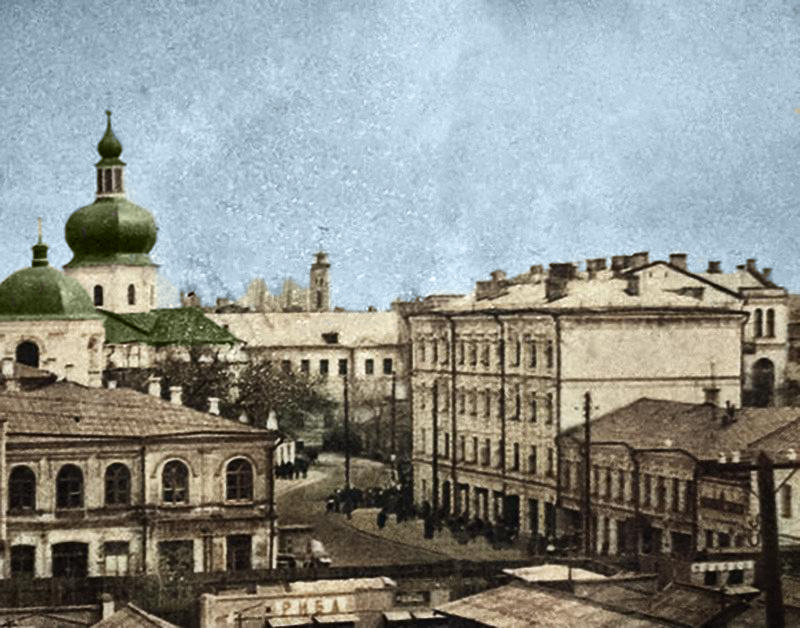 Садиба міська, Київ, Хорива вул., 2